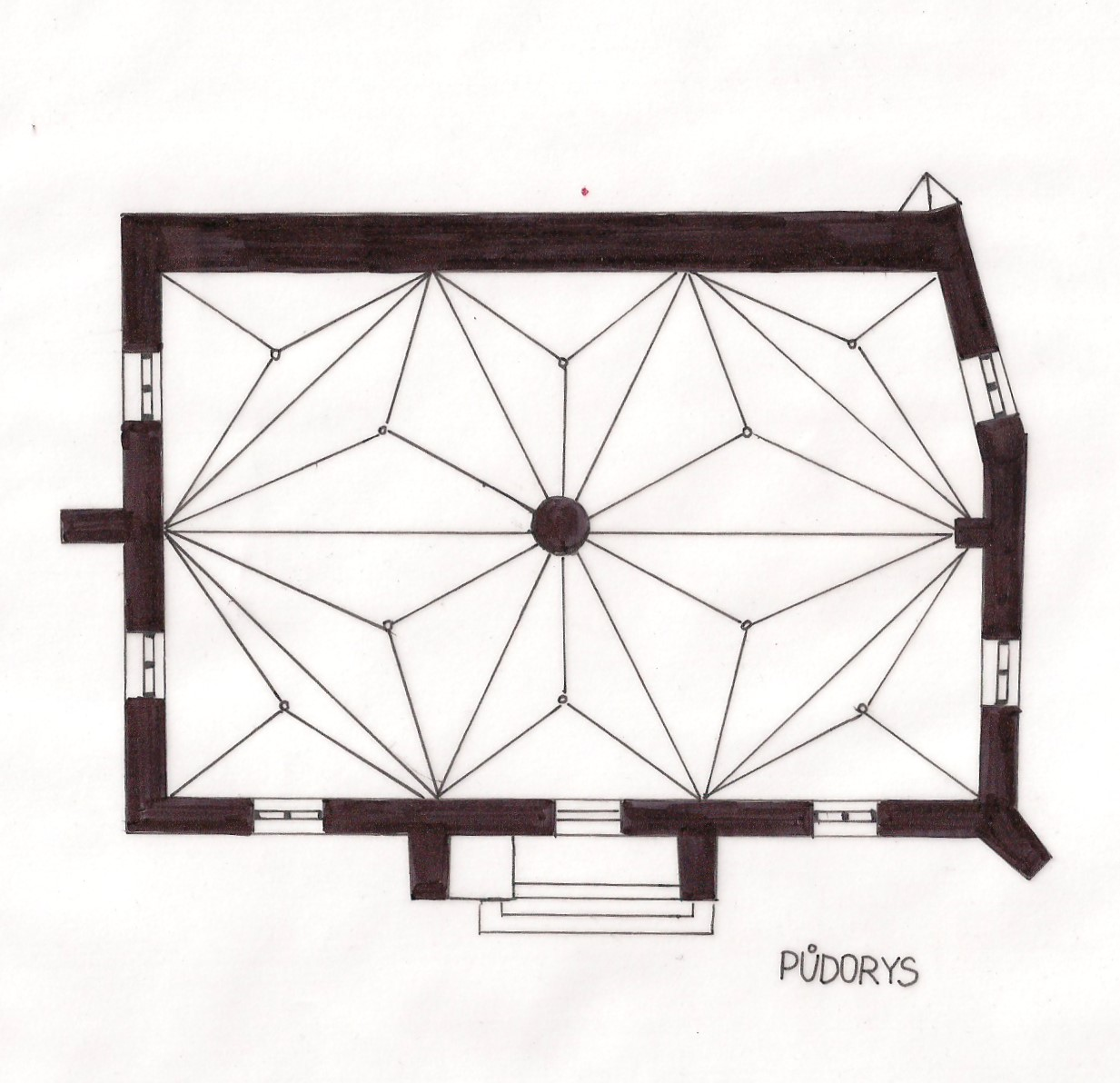 Pudorys kostel sv. Bartolomeje Cheb